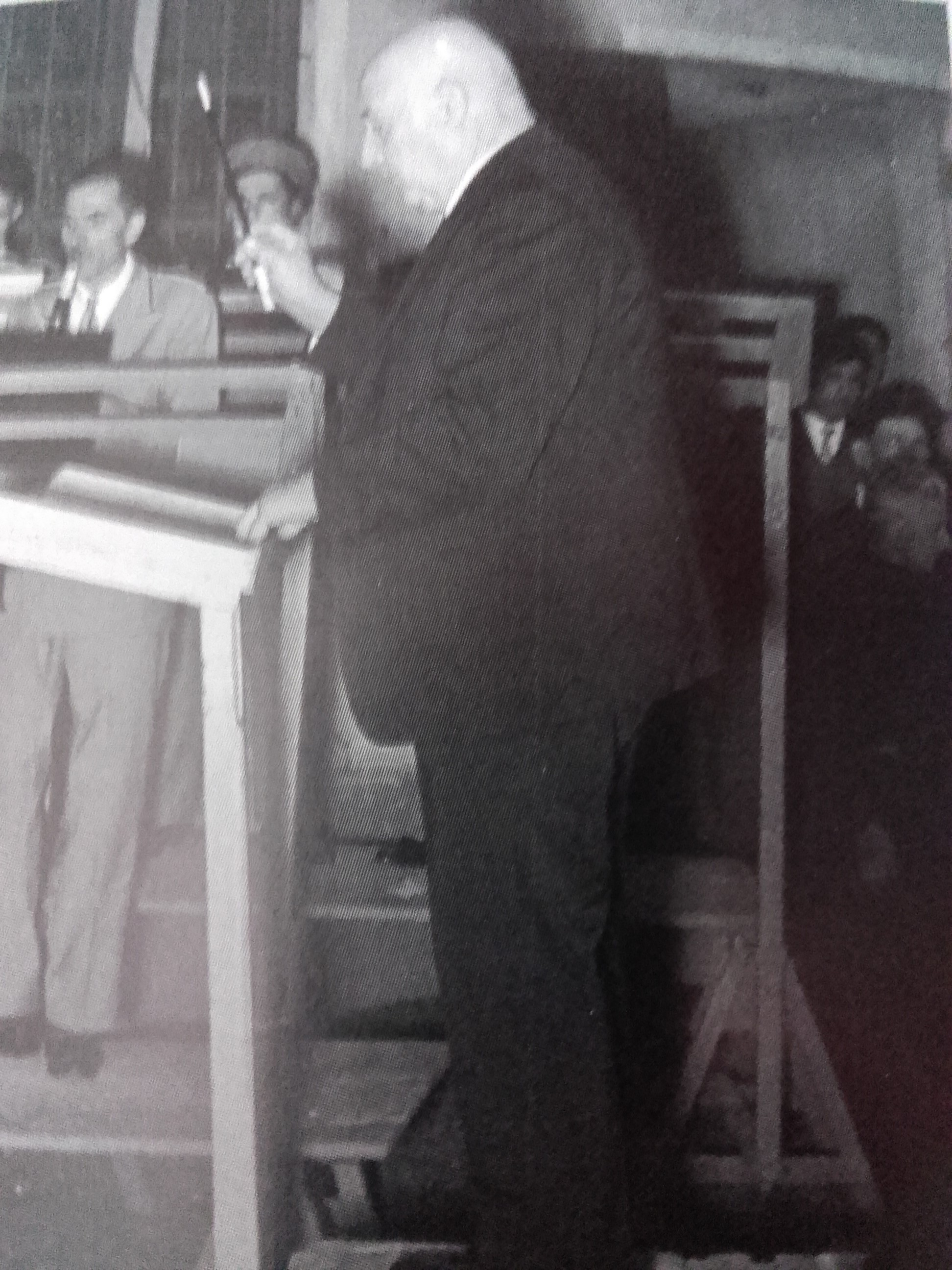 Quirino Besati dirige il Corpo Musicale di Grantola